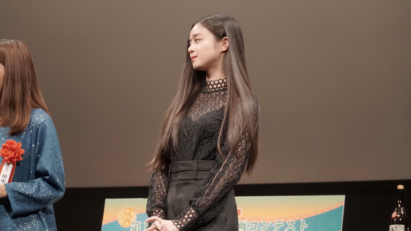 佐倉星、うえだ城下町映画祭表彰式。